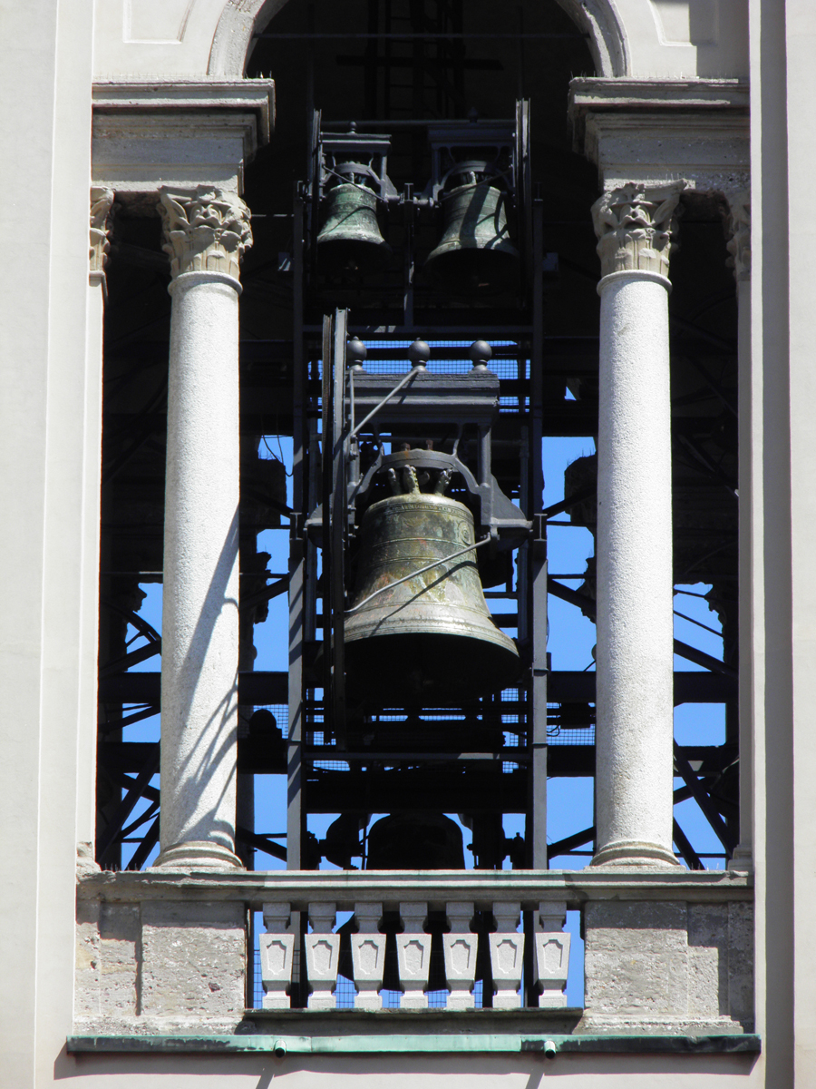 Il campanone del Santuario di Rho